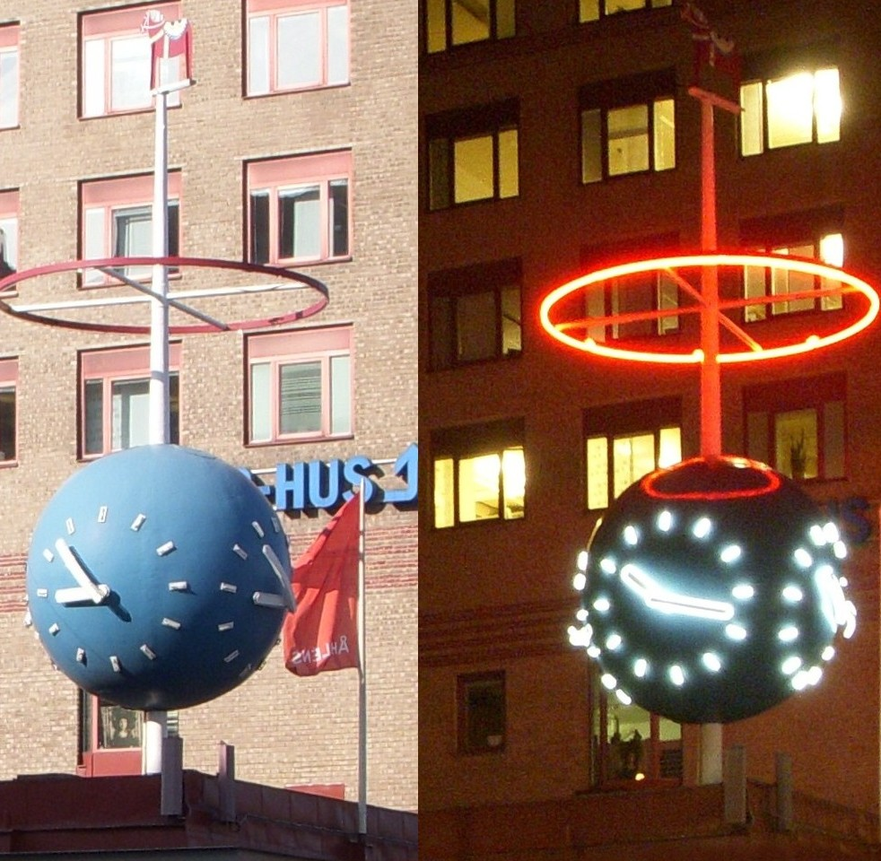 Åhléns tidsklot, Åhléns söder, Stockholm